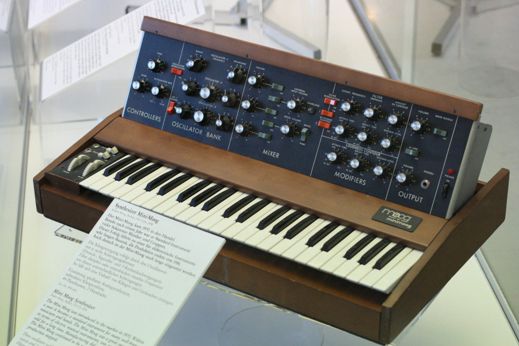 Analoger Syntesizer.